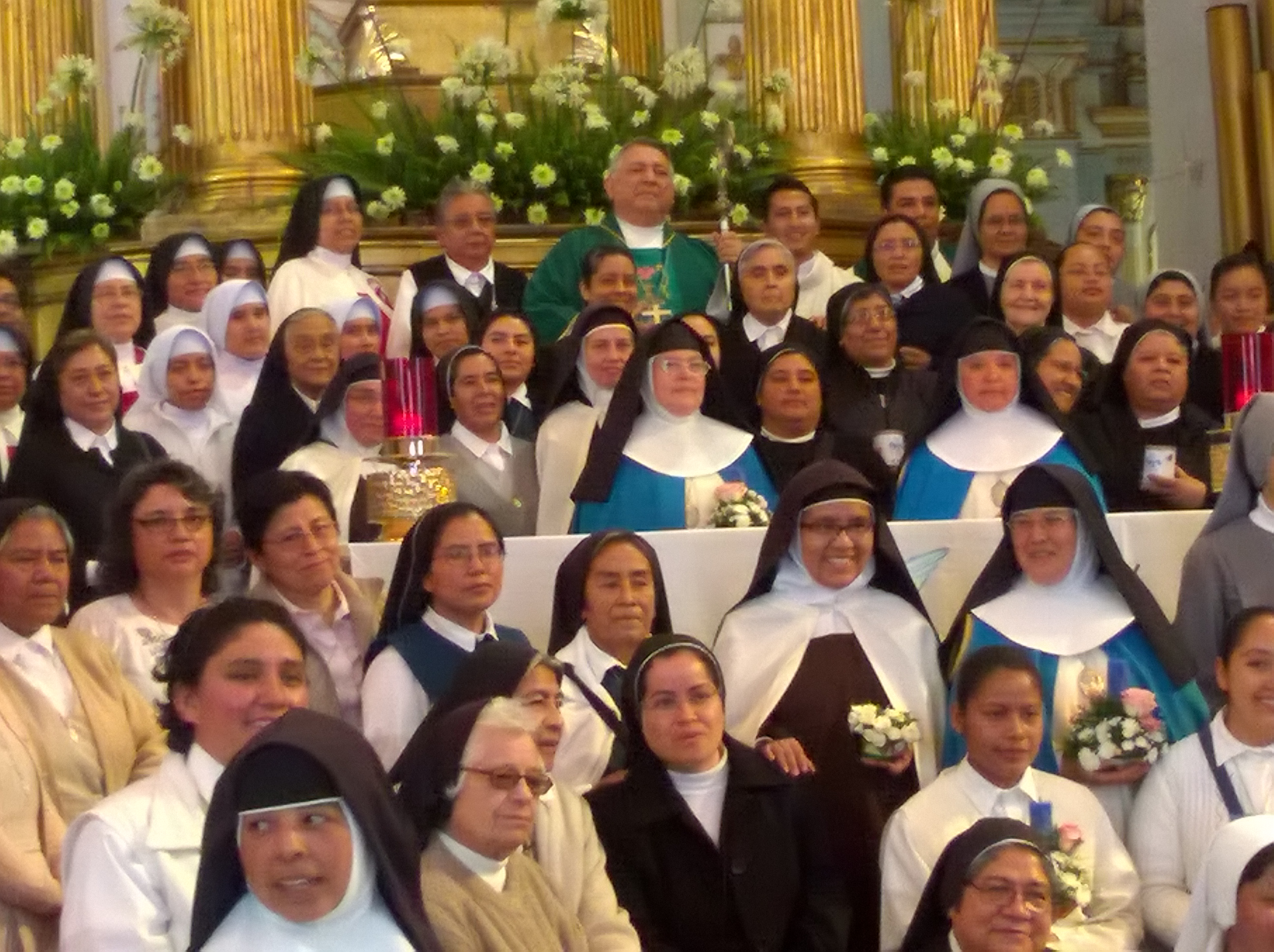 Monjas de Córdoba, Veracruz con su obispo